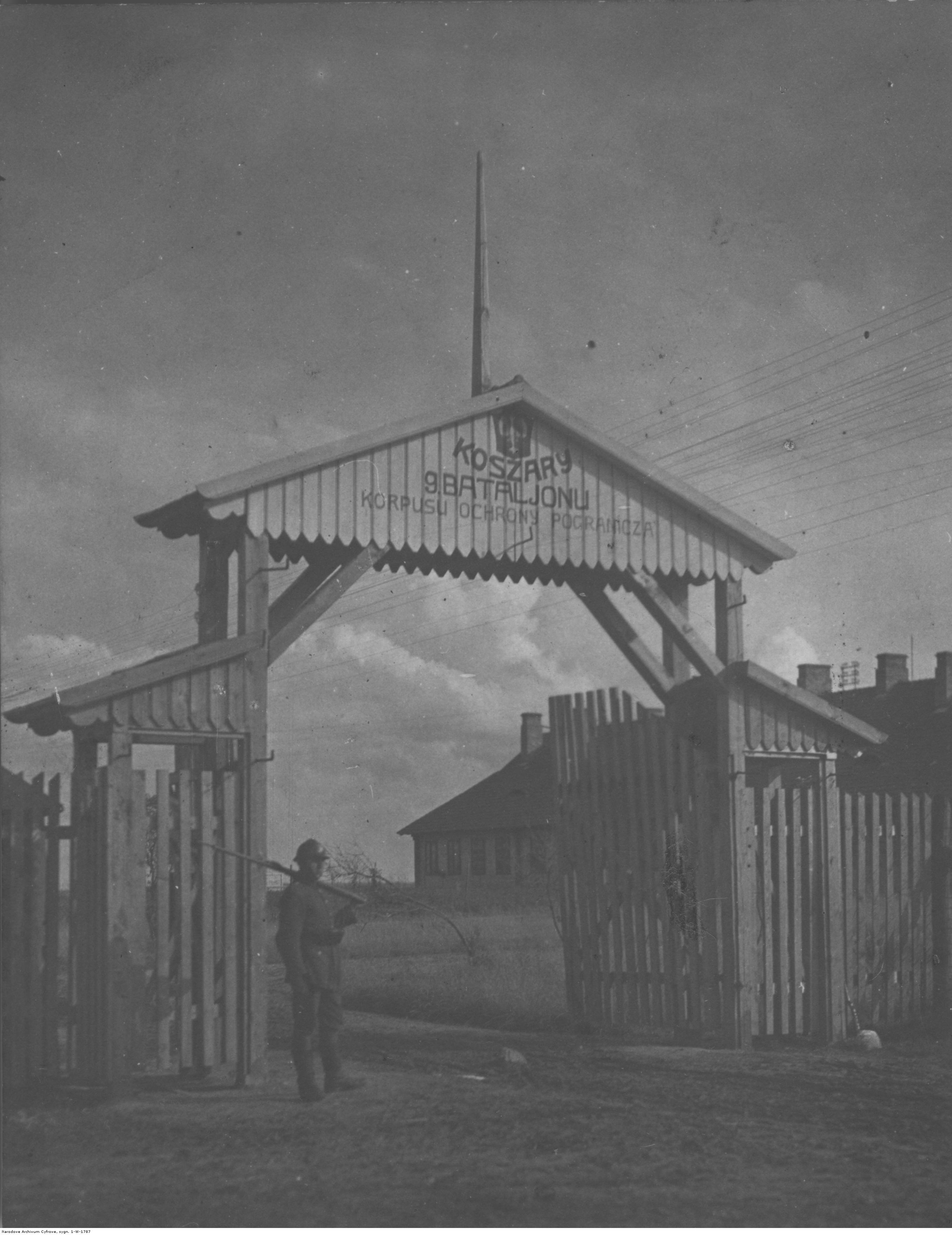 Koszary 9 Batalionu Korpusu Ochrony Pogranicza "Kleck" - brama wjazdowa. Koncern Ilustrowany Kurier Codzienny - Archiwum Ilustracji. Sygnatura: 1-W-1787